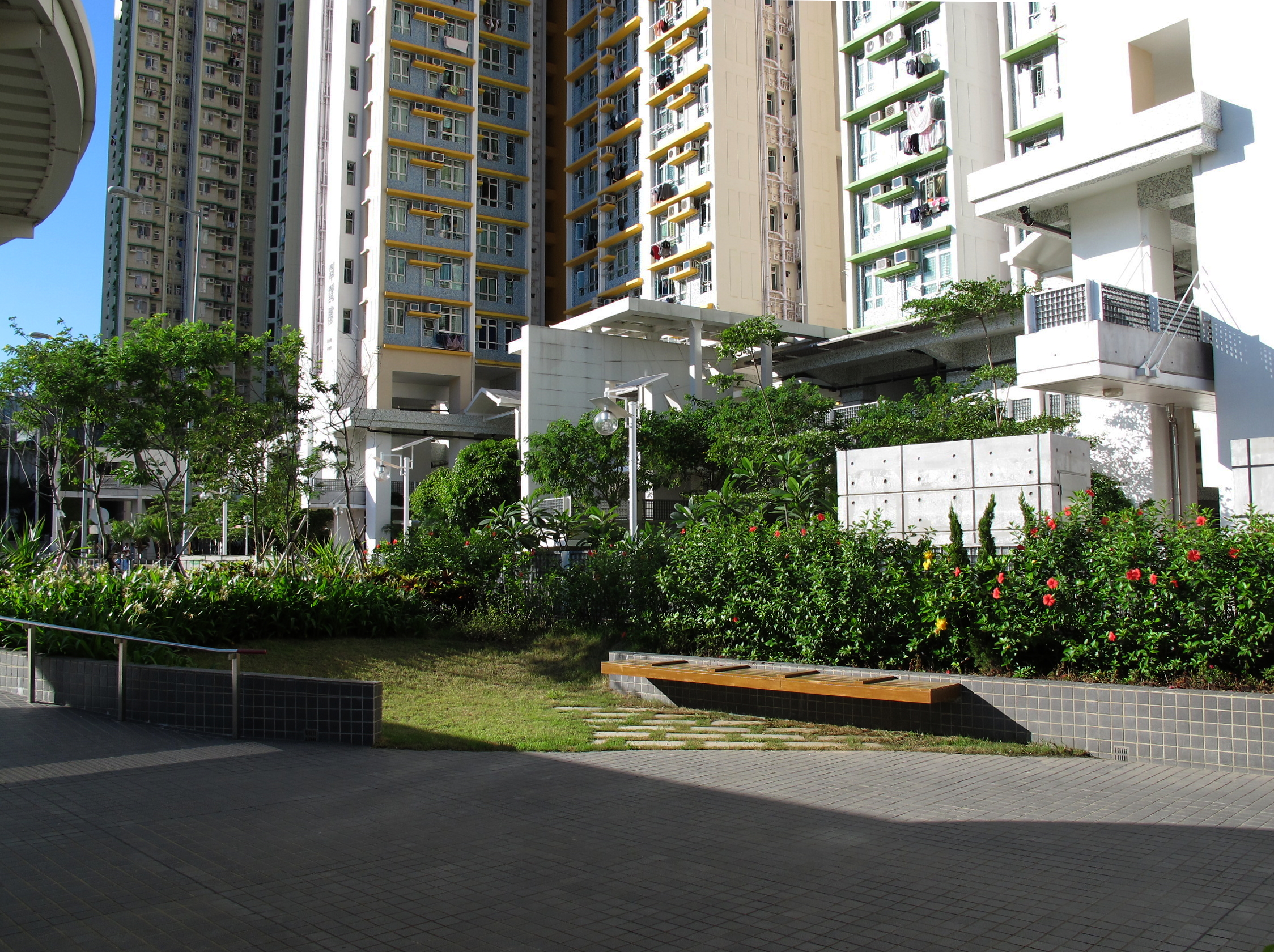 Yau Lai Estate Phase 4 Landscape 油麗邨第4期花園